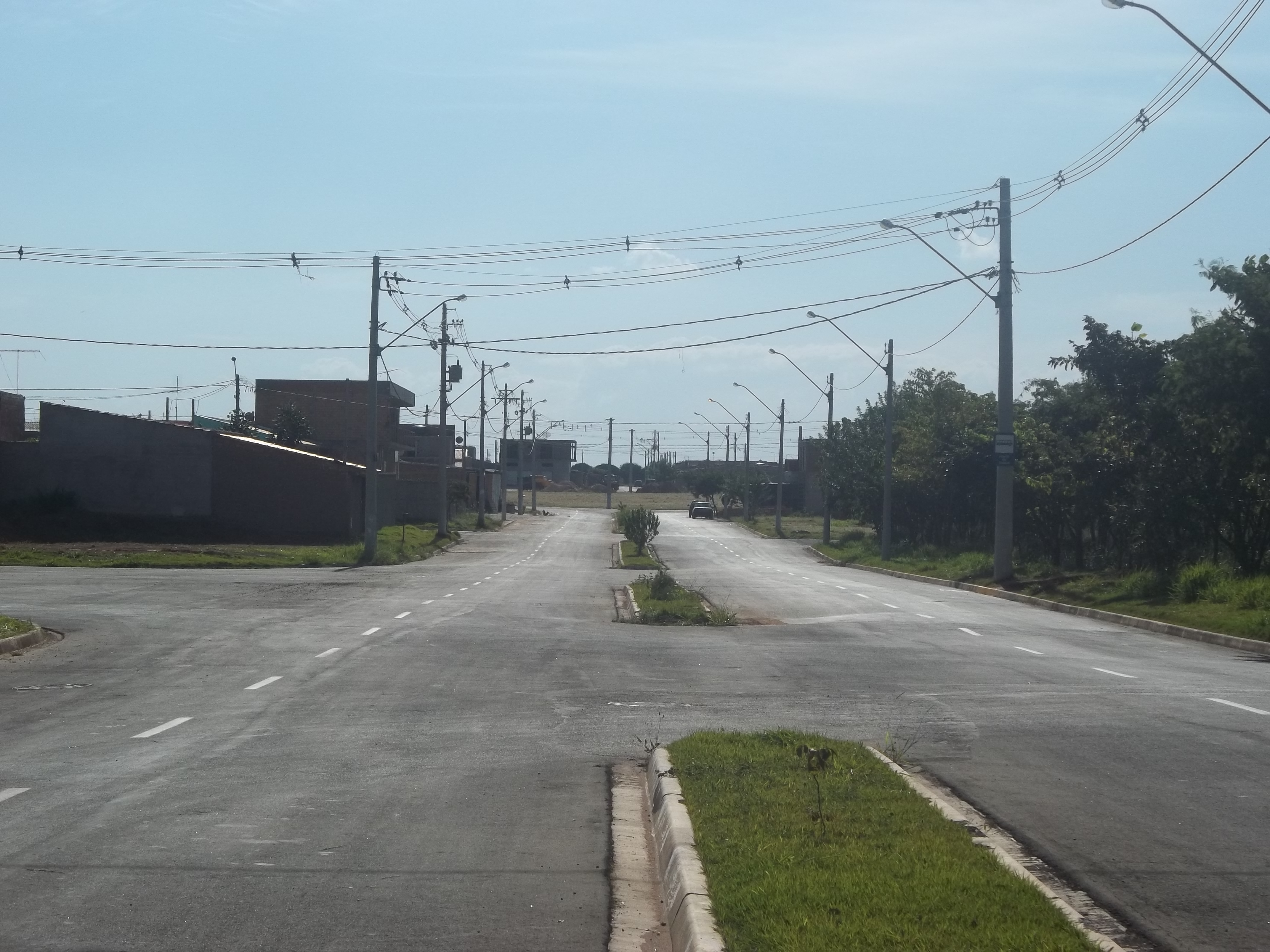 Vista da Avenida 2, do loteamento Residencial Viacava, no bairro Sâo José, Paulínia-SP, Brasil.